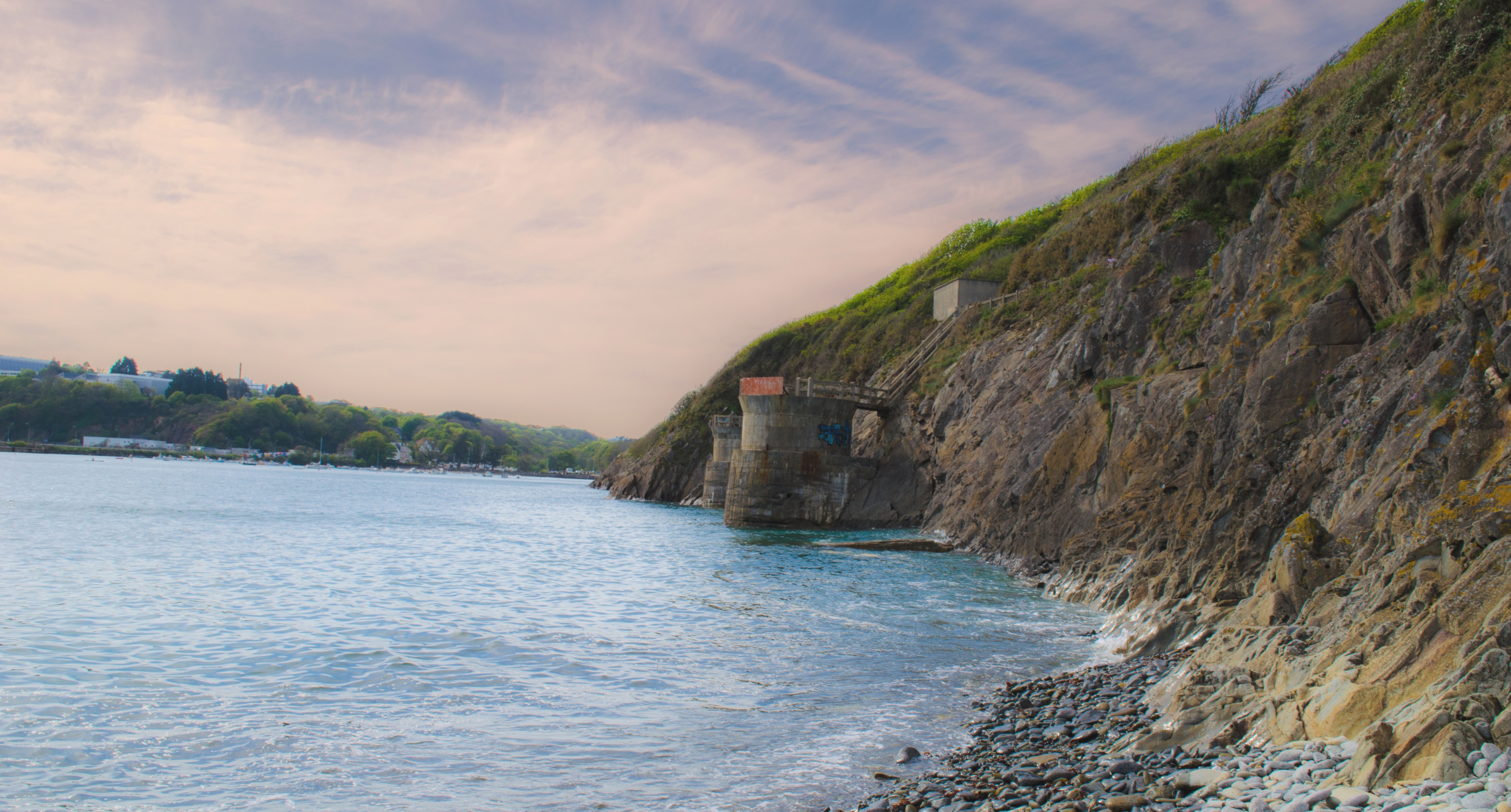 L'ancienne Centrale thermique de BREST-PORTZIC